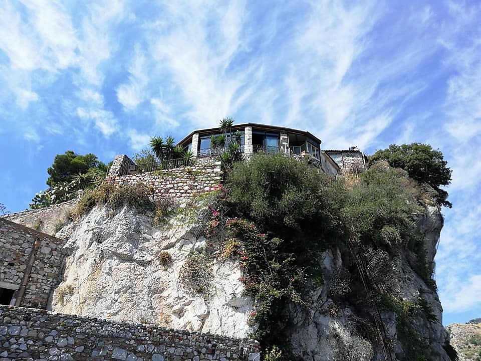 Manufatti del castello e auditorium visti da piazza Sant'Antonio.